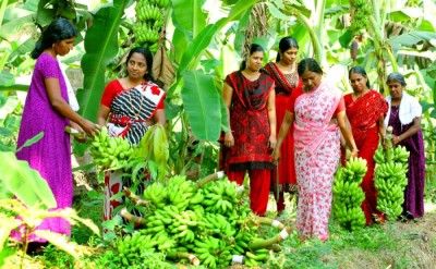 കുടുംബശ്രീ സംഘകൃഷി